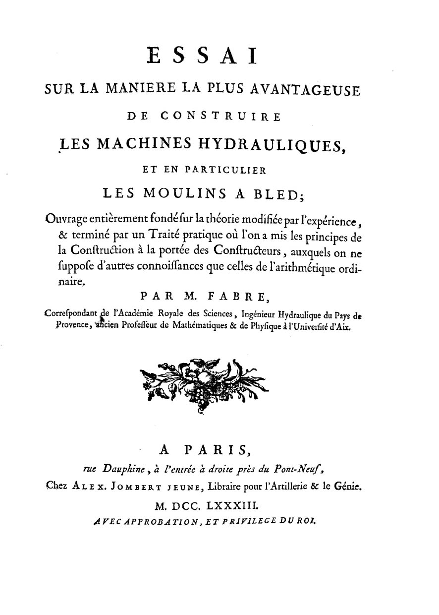 Frontespizio